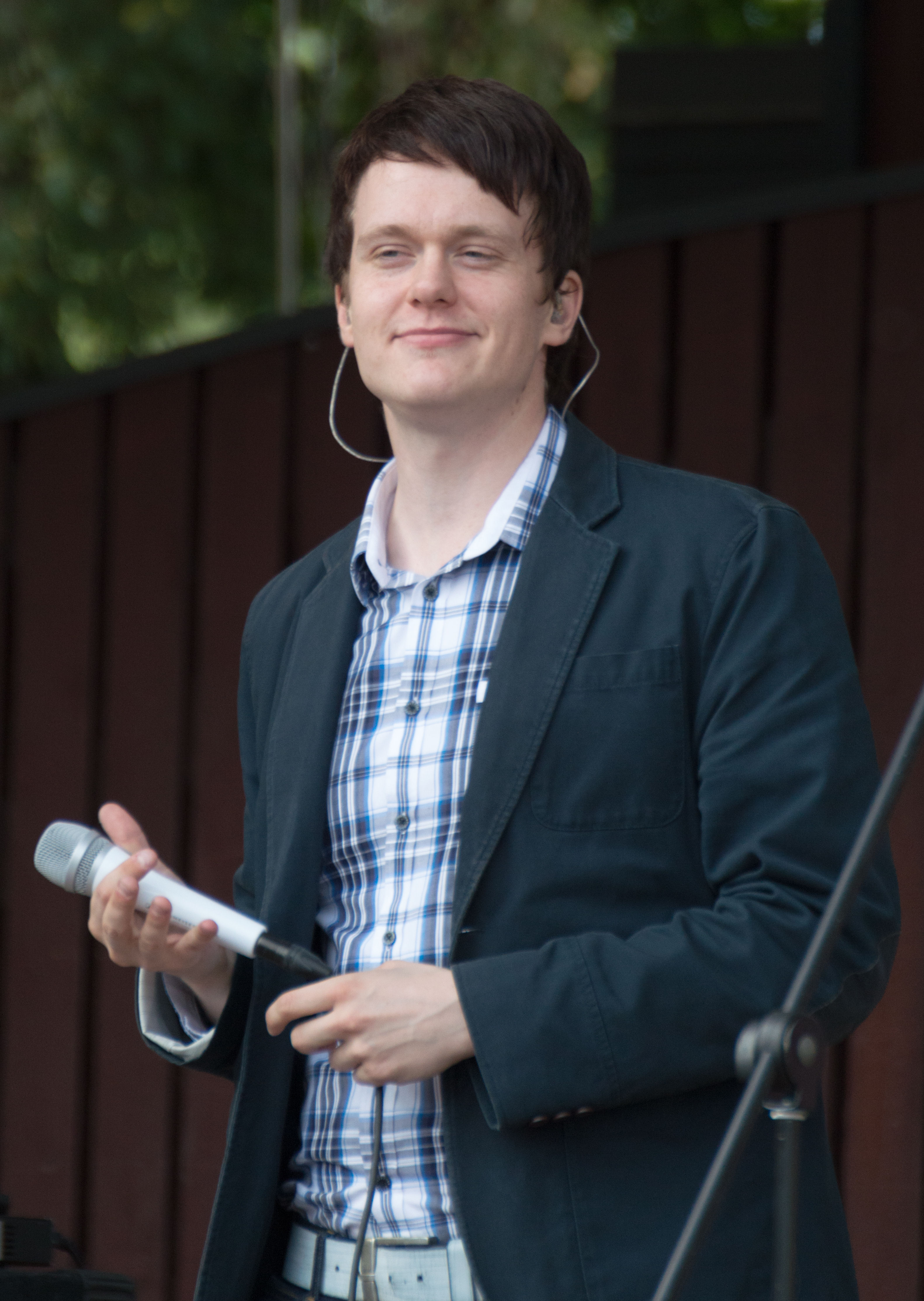 Pekka Mikkola, suomalainen iskelmälaulaja